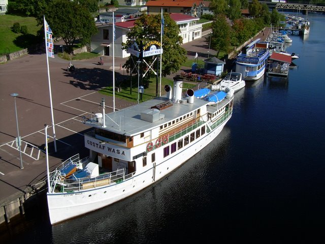 M/S Gustaf Wasa vid kaj i Leksand.